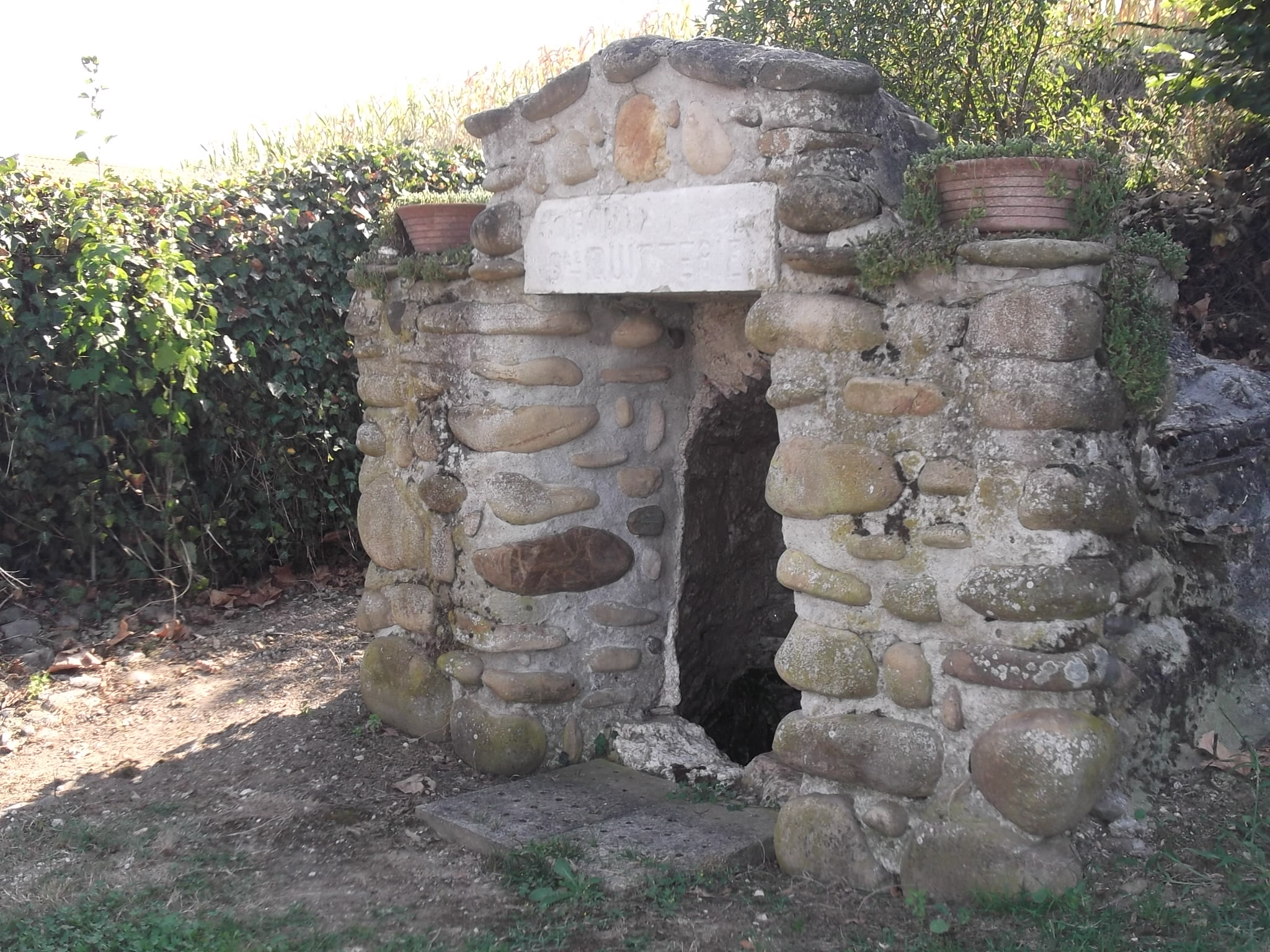 Fontaine St Quitterie d'Uzan 64370